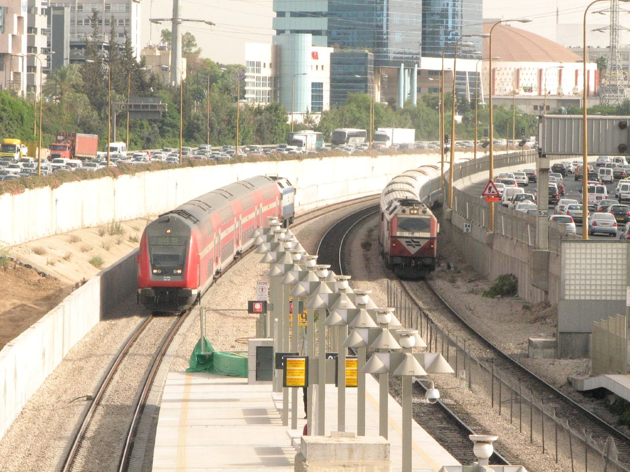 רכבות נוסעים על מסילת איילון סמוך לתחנת הרכבת תל אביב השלום.